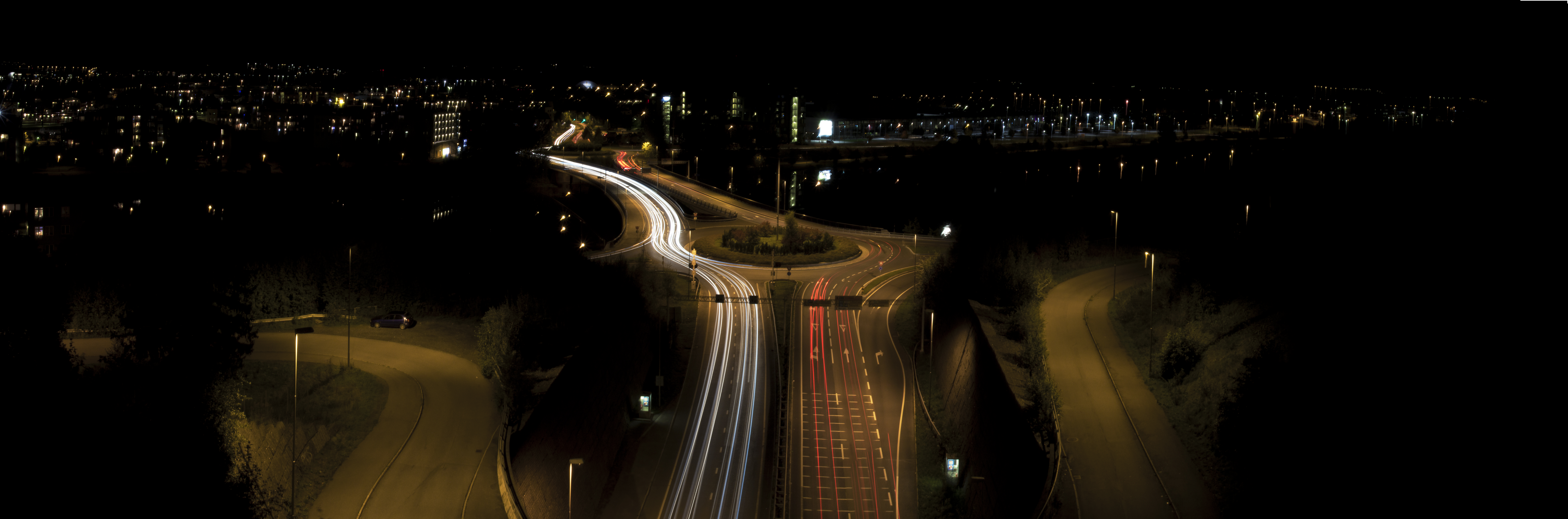 Fra Rælingstunnelen over Lillestrømbrua retning Lillestrøm